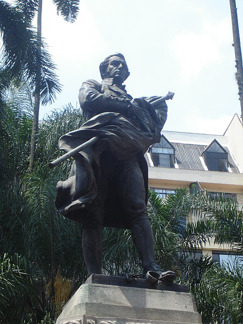 Sector Antiguo de la ciudad de Cali